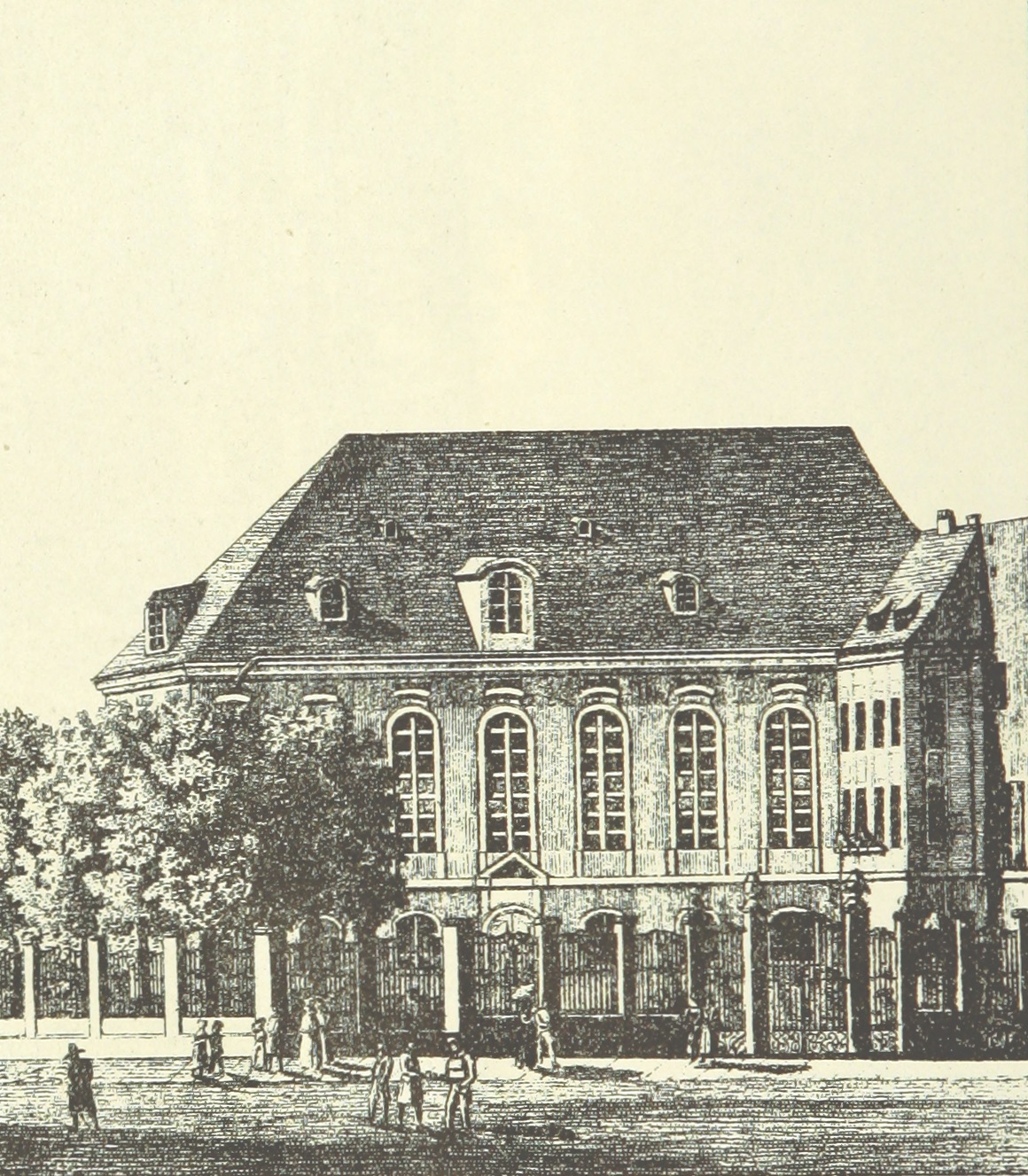 Die reformierte Kirche in Dresden aus den 1760er Jahren